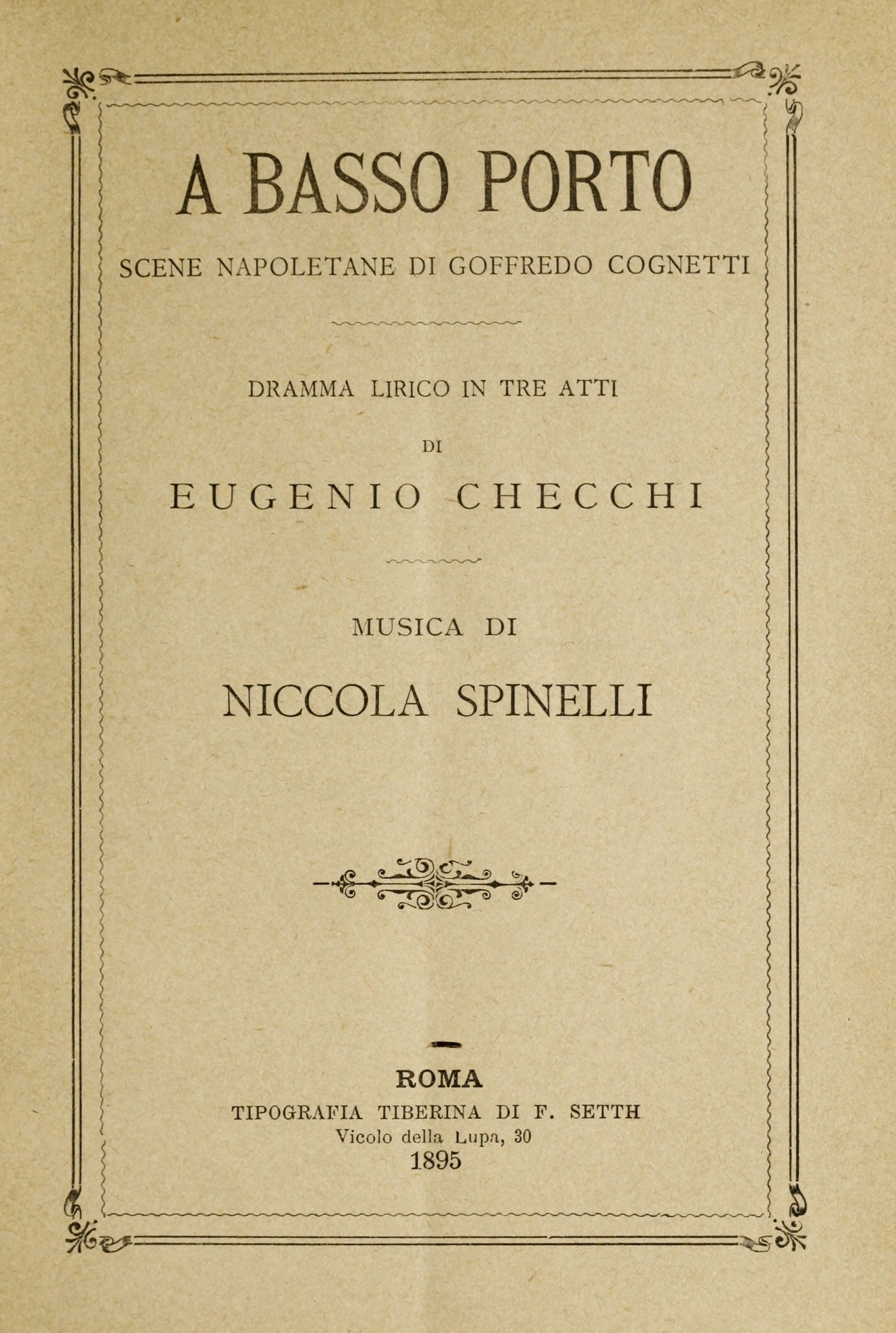 Title page from the opera "A basso porto : scene napoletane di goffredo cognetti, dramma lirico in tre atti" by Niccola Spinelli and Eugenio Checchi.